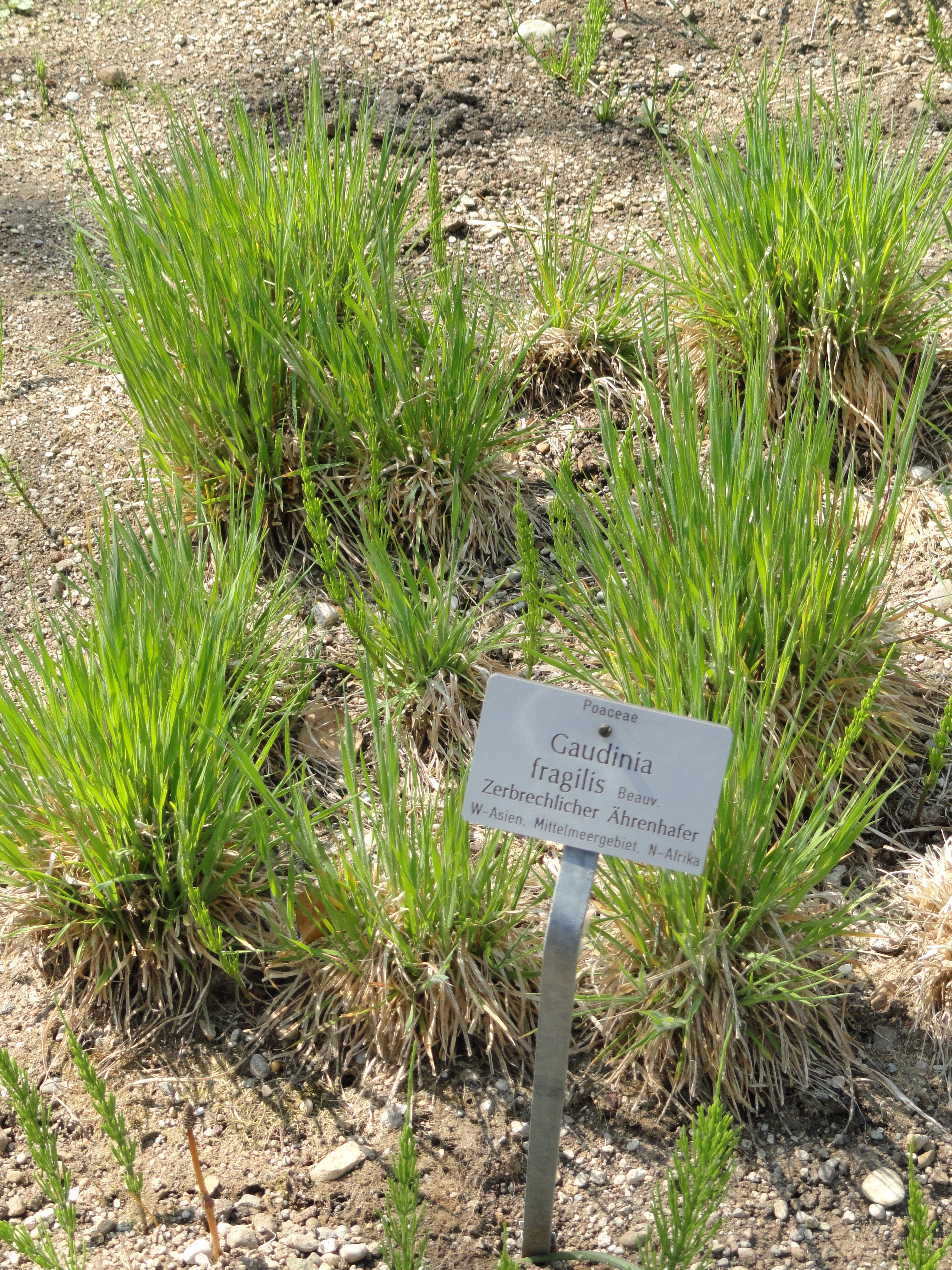 Gaudinia fragilis specimen in the Botanischer Garten München-Nymphenburg, Munich, Germany.